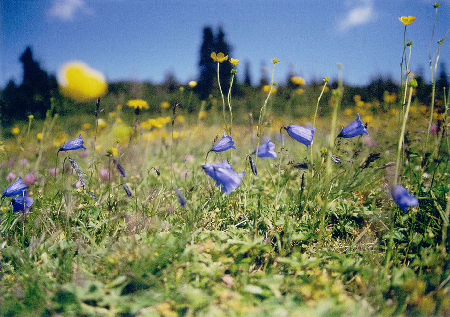 Alpine Vegetation auf der Rax in Niederösterreich – Glockenblumen (vermutlich Campanula scheuchzeri) und Hahnenfuß (Ranunculus spec.)